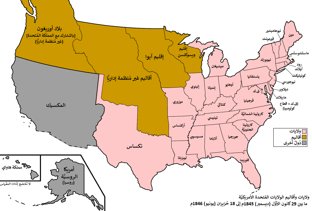 خريطة الولايات والأقاليم الأمريكيَّة كما كانت ما بين شهريّ كانون الأوَّل (ديسمبر) 1845 إلى حُزيران (يونيو) 1846. بِتاريخ 29 كانون الأوَّل (ديسمبر) 1845، دخلت جُمهُوريَّة تكساس وكُل الأقاليم التابعة لها ضمن الاتحاد الفدرالي الأمريكي لِتُصبح ولاية جديدةً باسم ولاية تكساس. وبِتاريخ 18 حُزيران (يونيو) 1846، دخلت كافَّة بلاد أوريغون الواقعة أسفل دائرة العرض التاسعة والأربعين، باستثناء جزيرة ڤانكوڤر، ضمن الاتحاد الفدرالي الأمريكي، باعتبارها إقليمًا غير مُنظم إداريًّا.